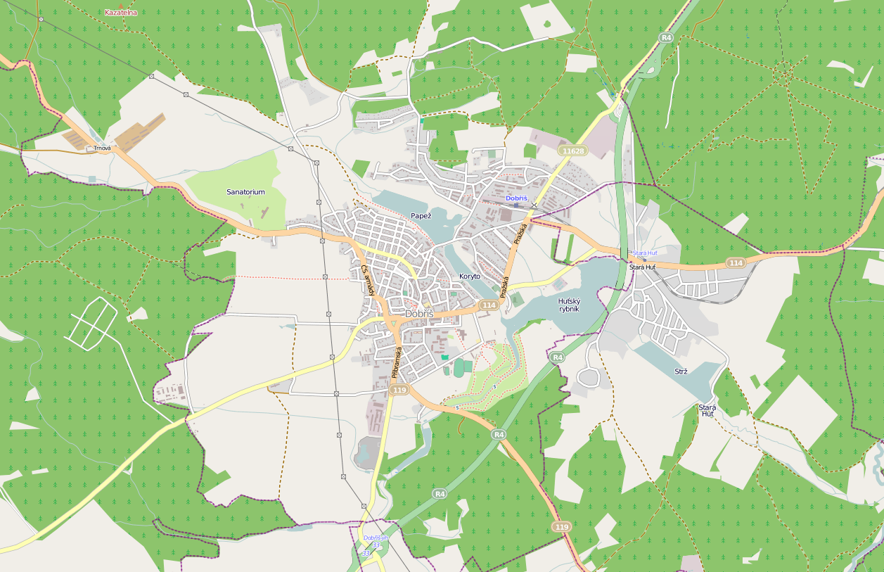 Mapa Dobříše a Staré Huti